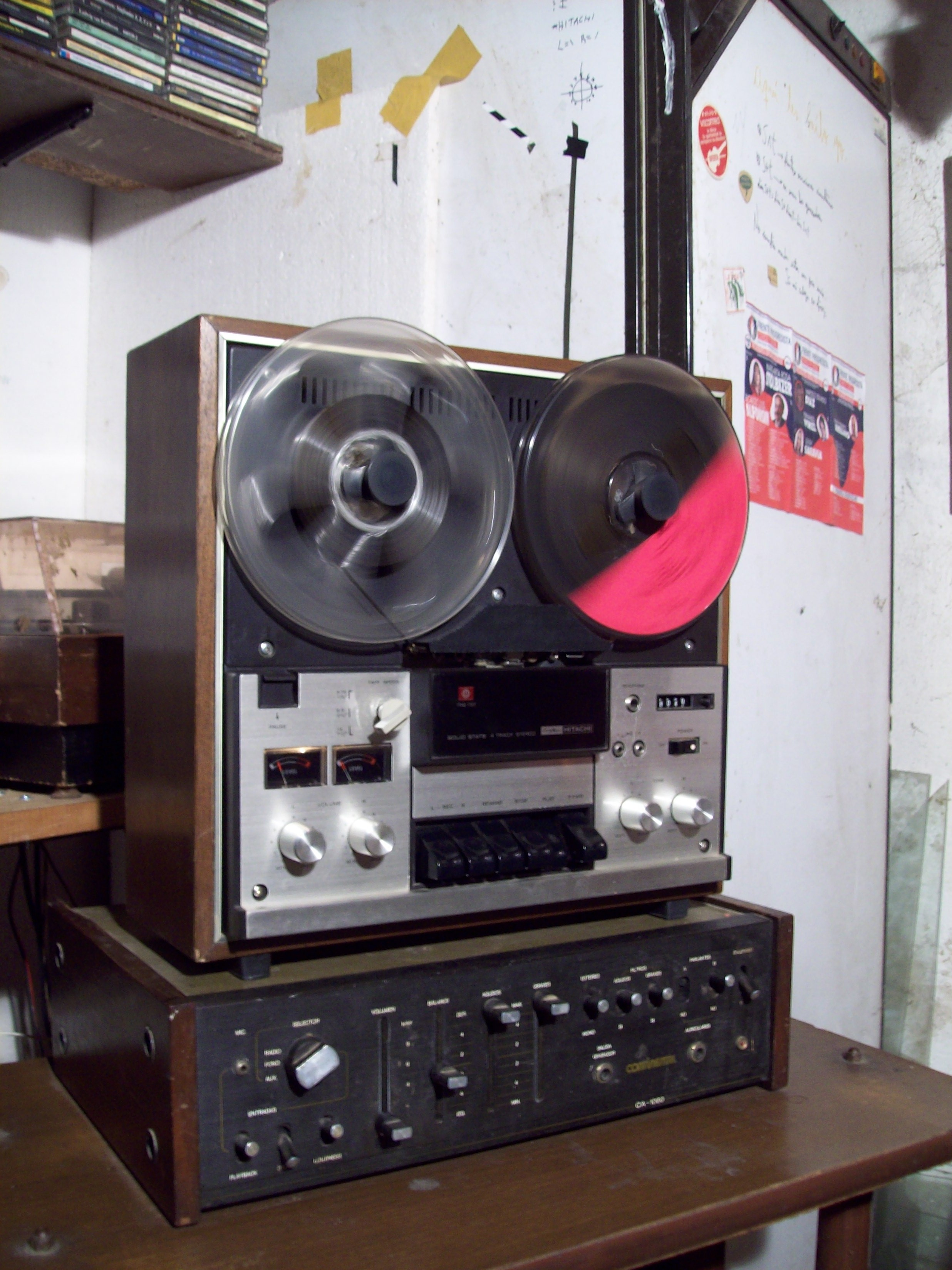 Grabador de cinta abierta Hitachi de 1972 reproduciendo la Novena Sinfonía de Beethoven interpretada por George Solti.